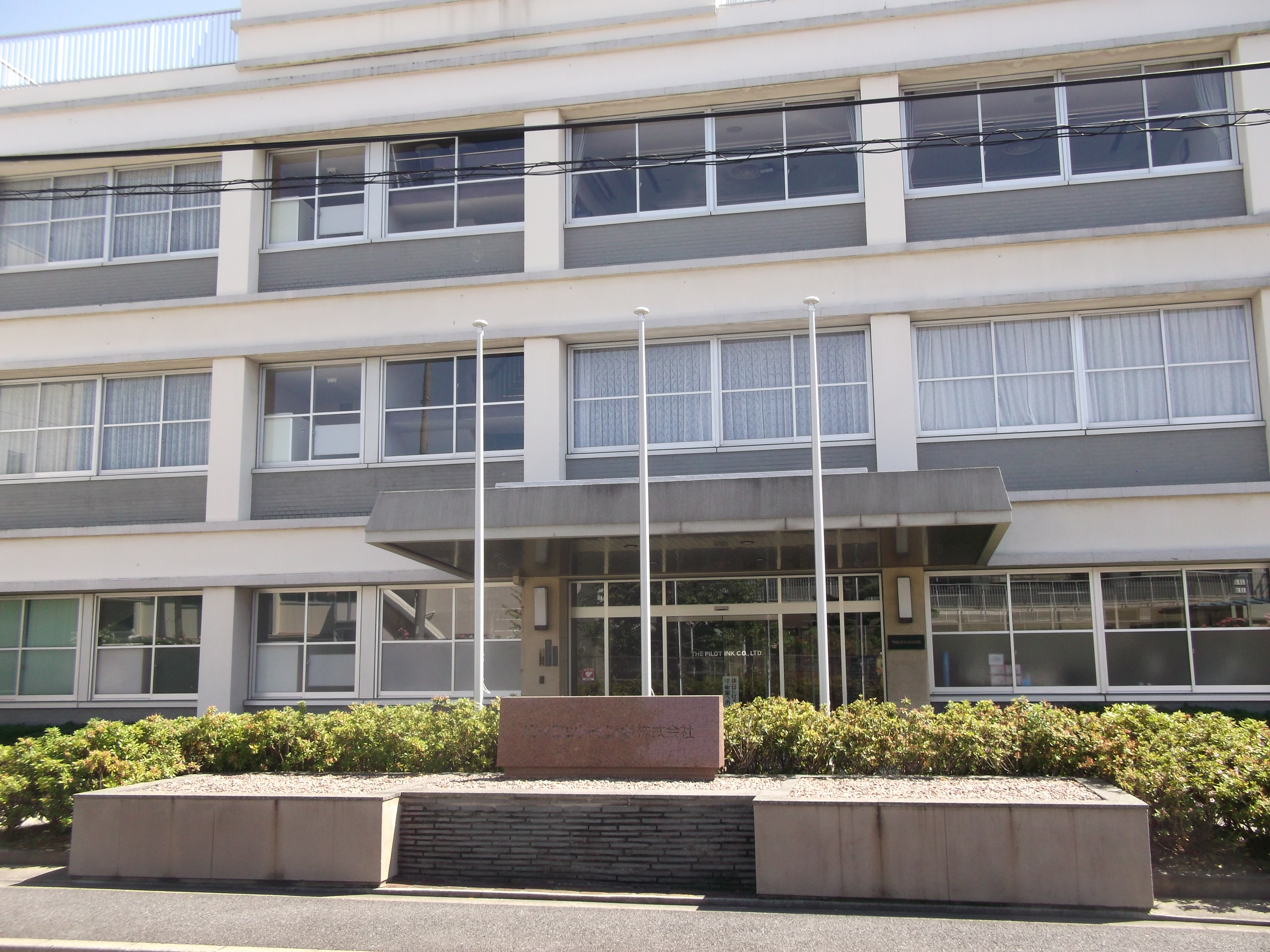 名古屋市昭和区のパイロットインキ本社を北側公道より写す